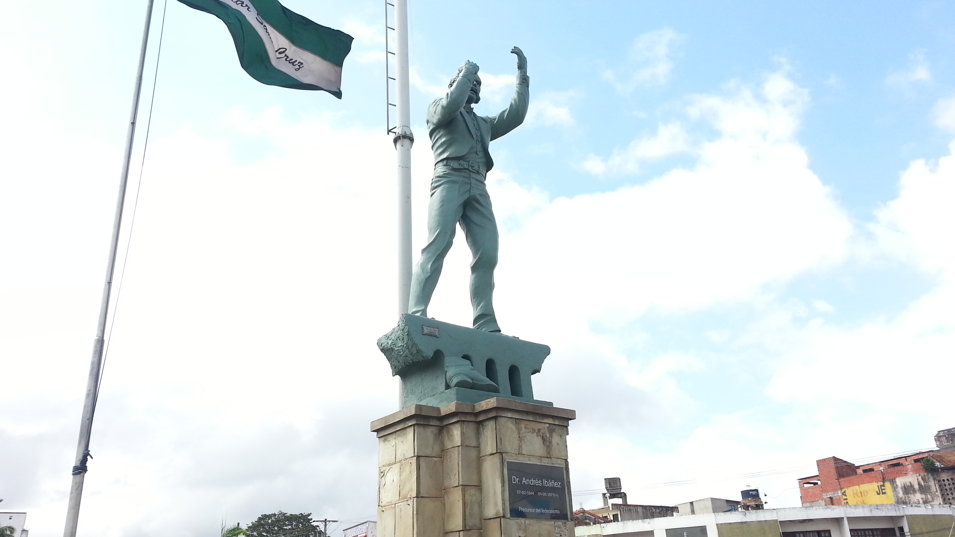 Monumento a Andrés Ibáñez en Santa Cruz, Bolivia. This medium shows the protected monument with the number S/00-000 in Bolivia.